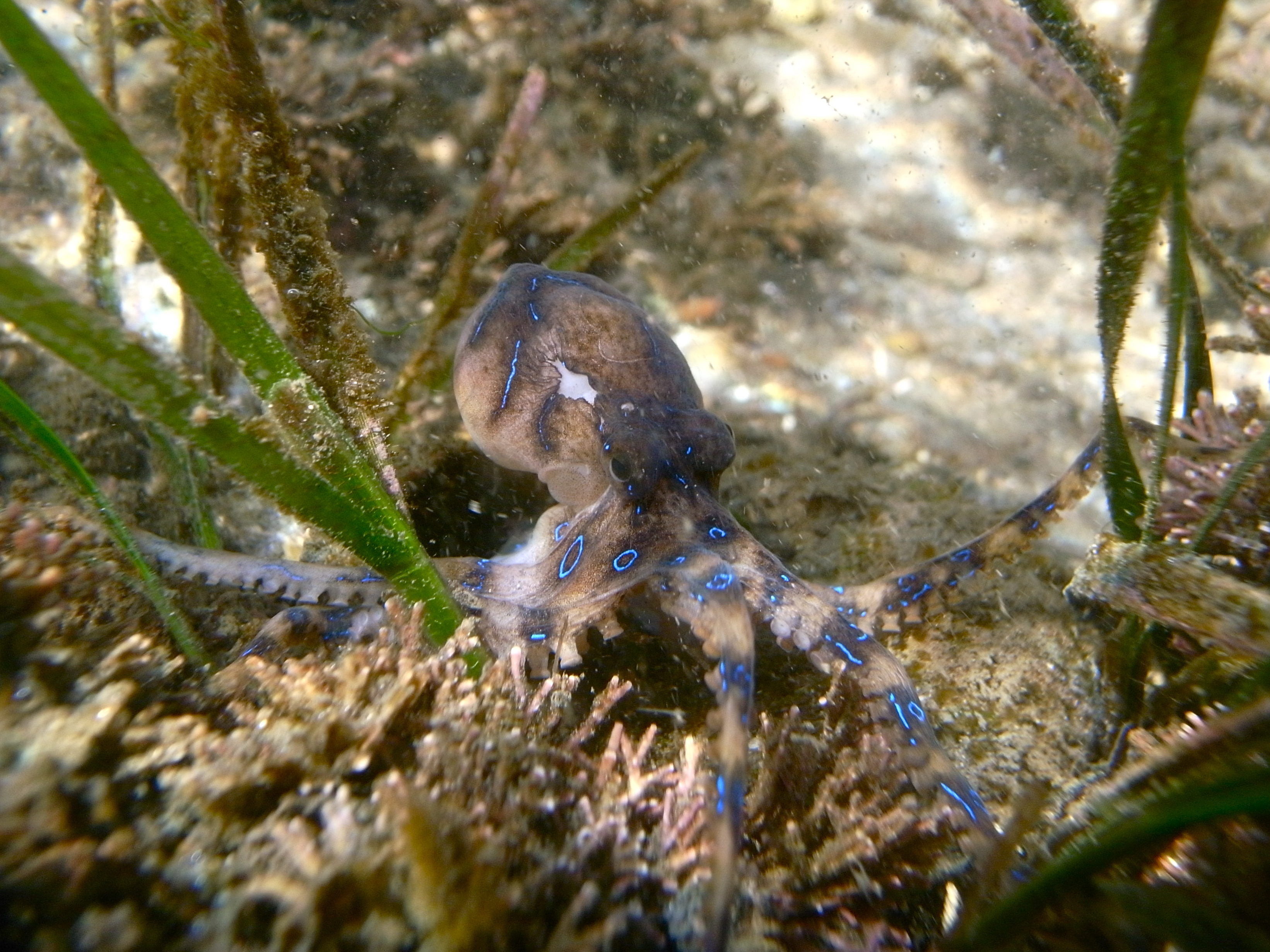 Blaugeringelter Kraken (Hapalochlaena maculosa) in Ufernähe der Parsley Bay, Sydney.